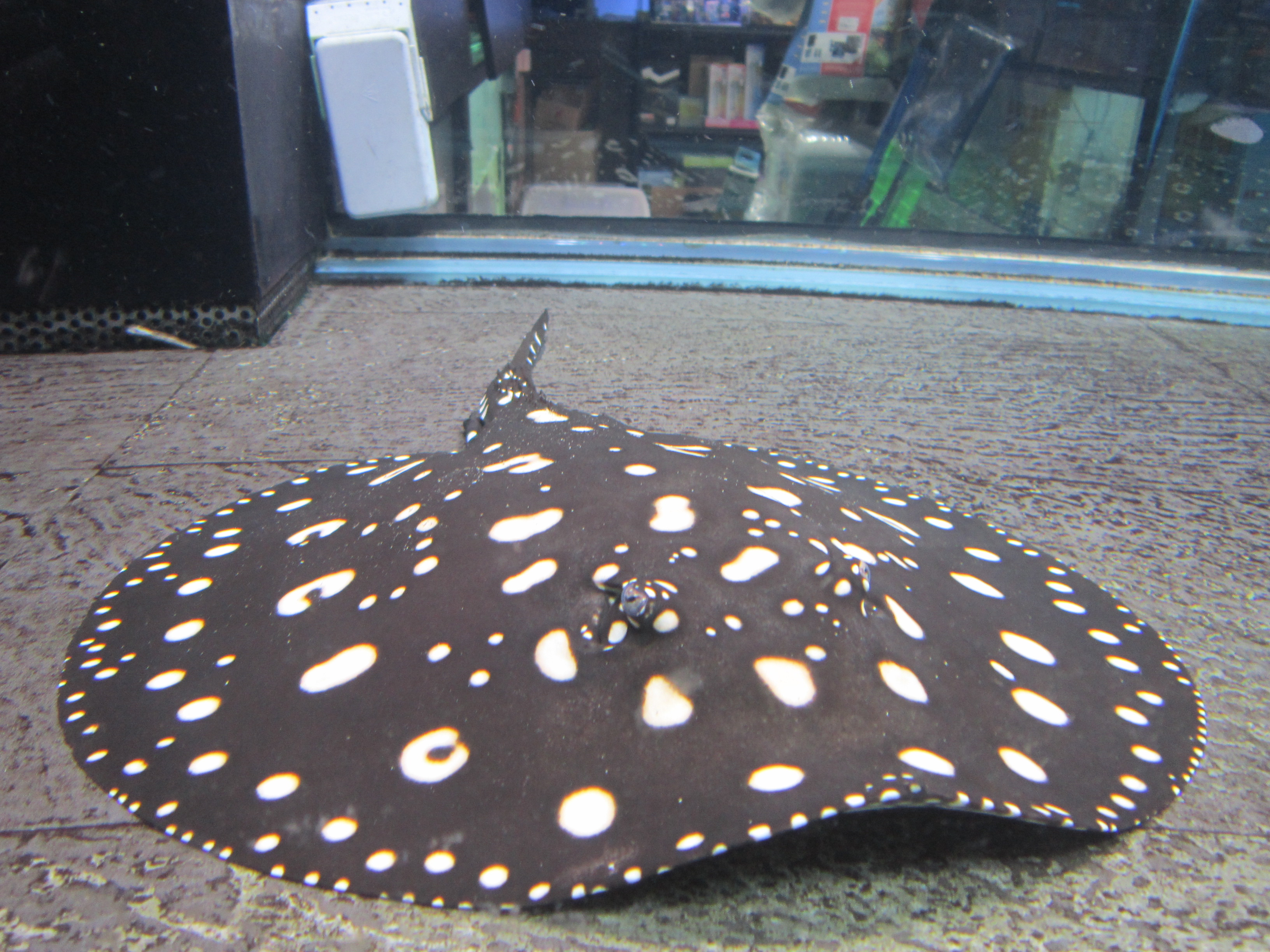 魟(滿天星)